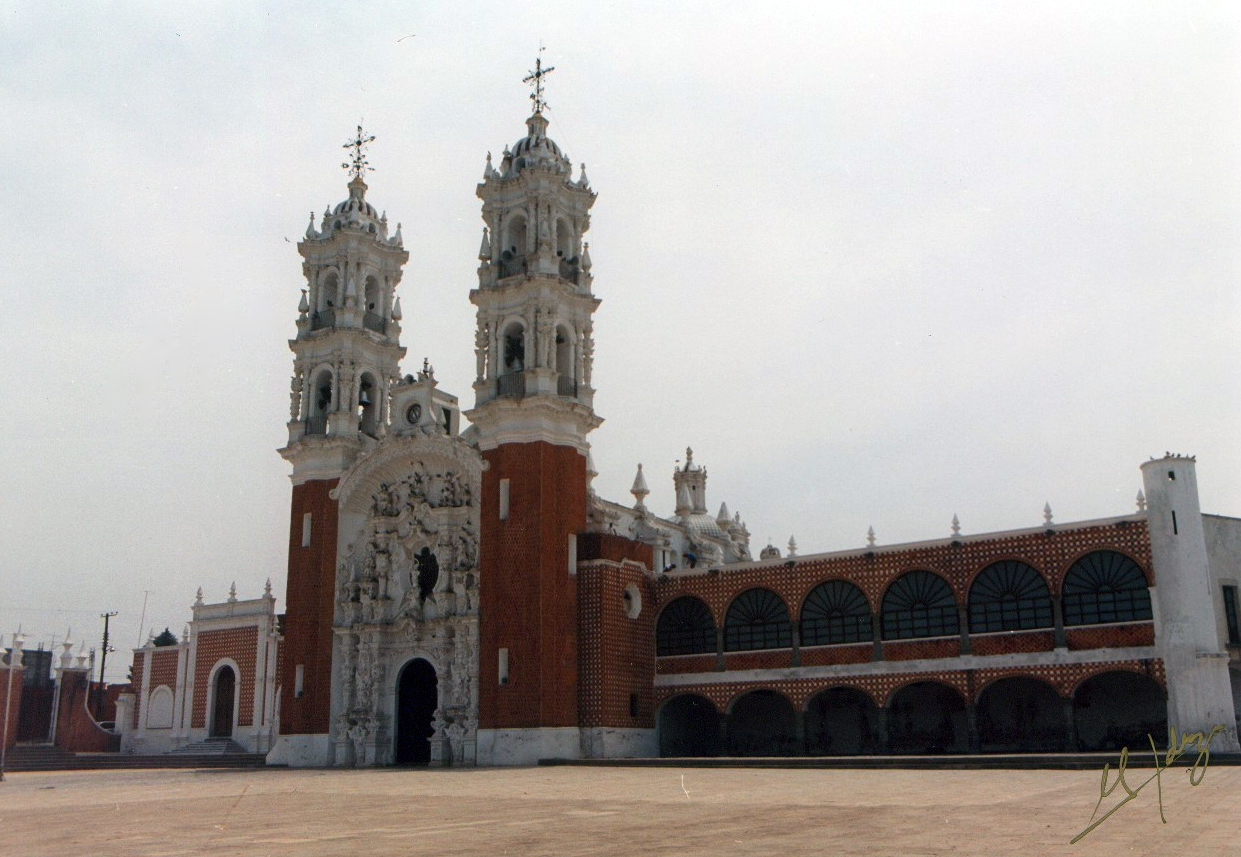 Panoramica de la Basílica de Ocotlán.